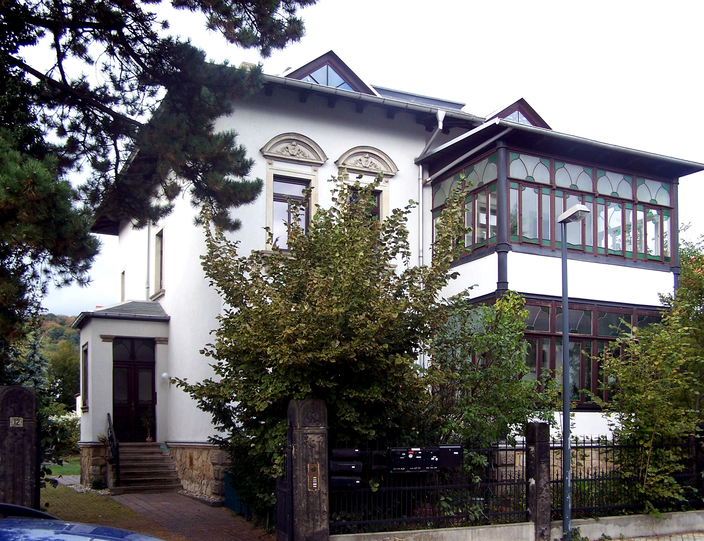 Goethestr. 12 in Radebeul